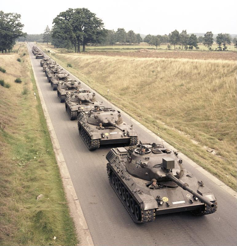 Reportage Bundeswehr Leopardpanzer, Munsterlager, KTrS III [Munsterlager, Truppenübungsplatz in der Lüneburger Heide]